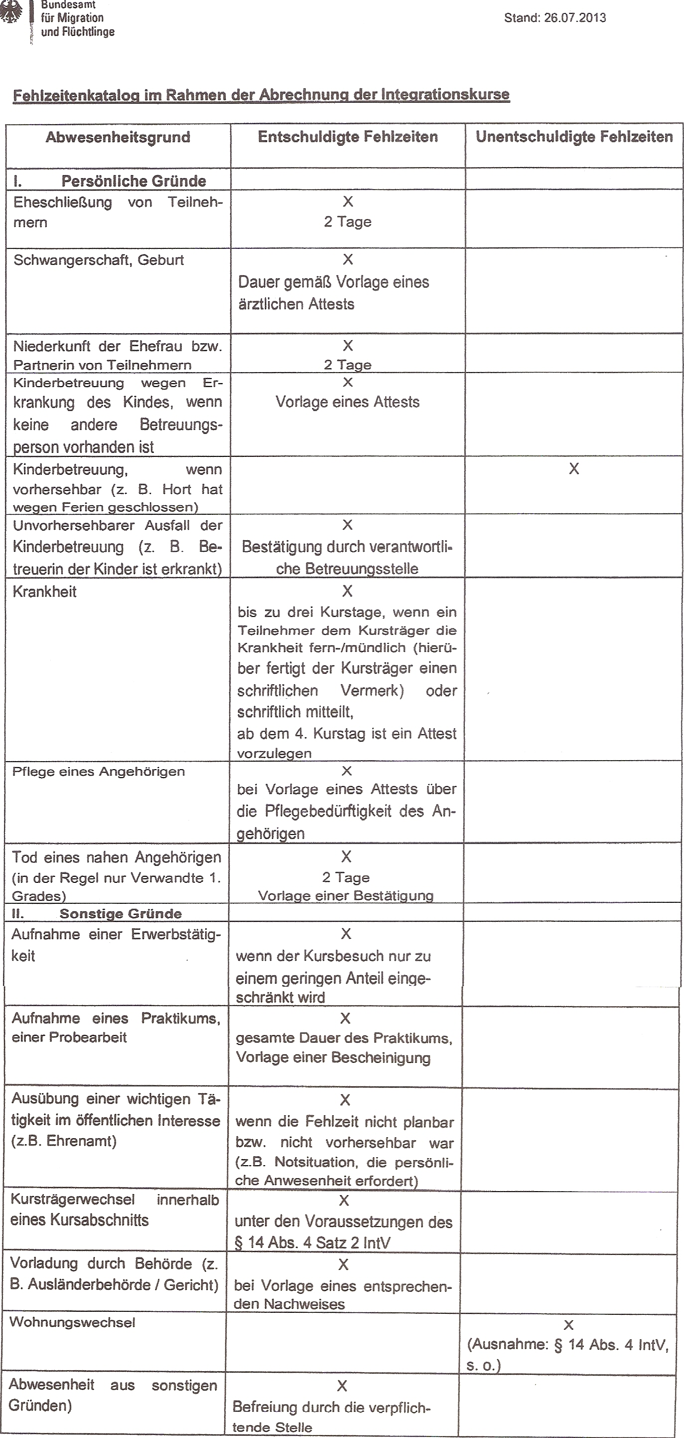 Auflistung der Abwesenheitsgründe für entschuldigte und unentschuldigte Fehlzeiten.